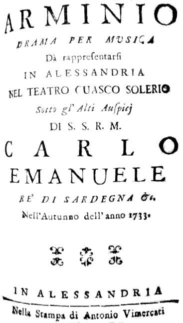 Gaetano Maria Schiassi - Arminio - title page of the libretto - Alessandria 1733